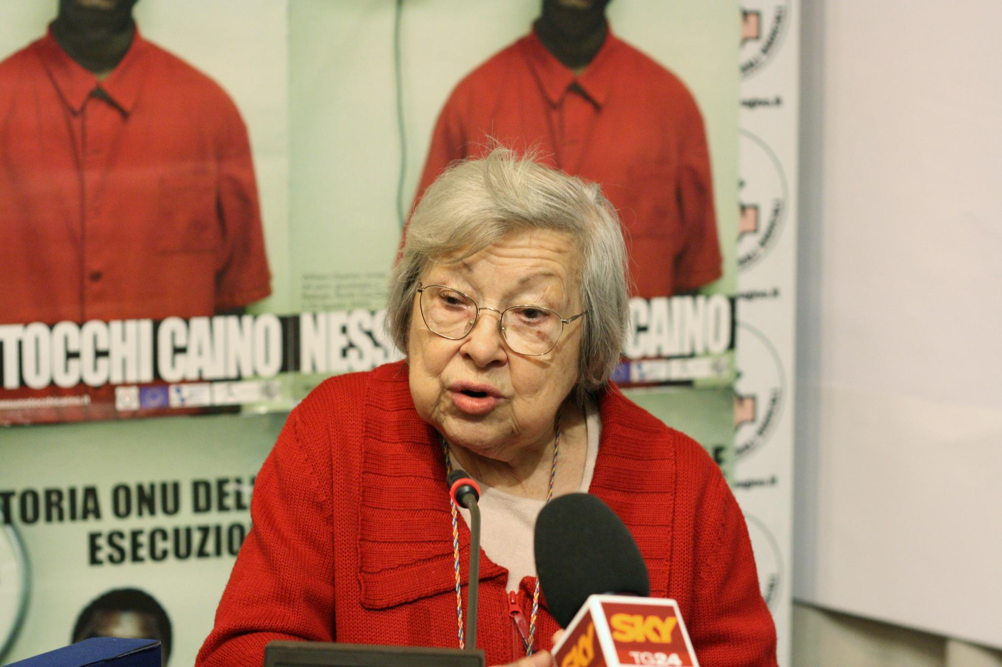 Italian MP Lidia Menapace attendig a press conferenceIMG_4791.jpg